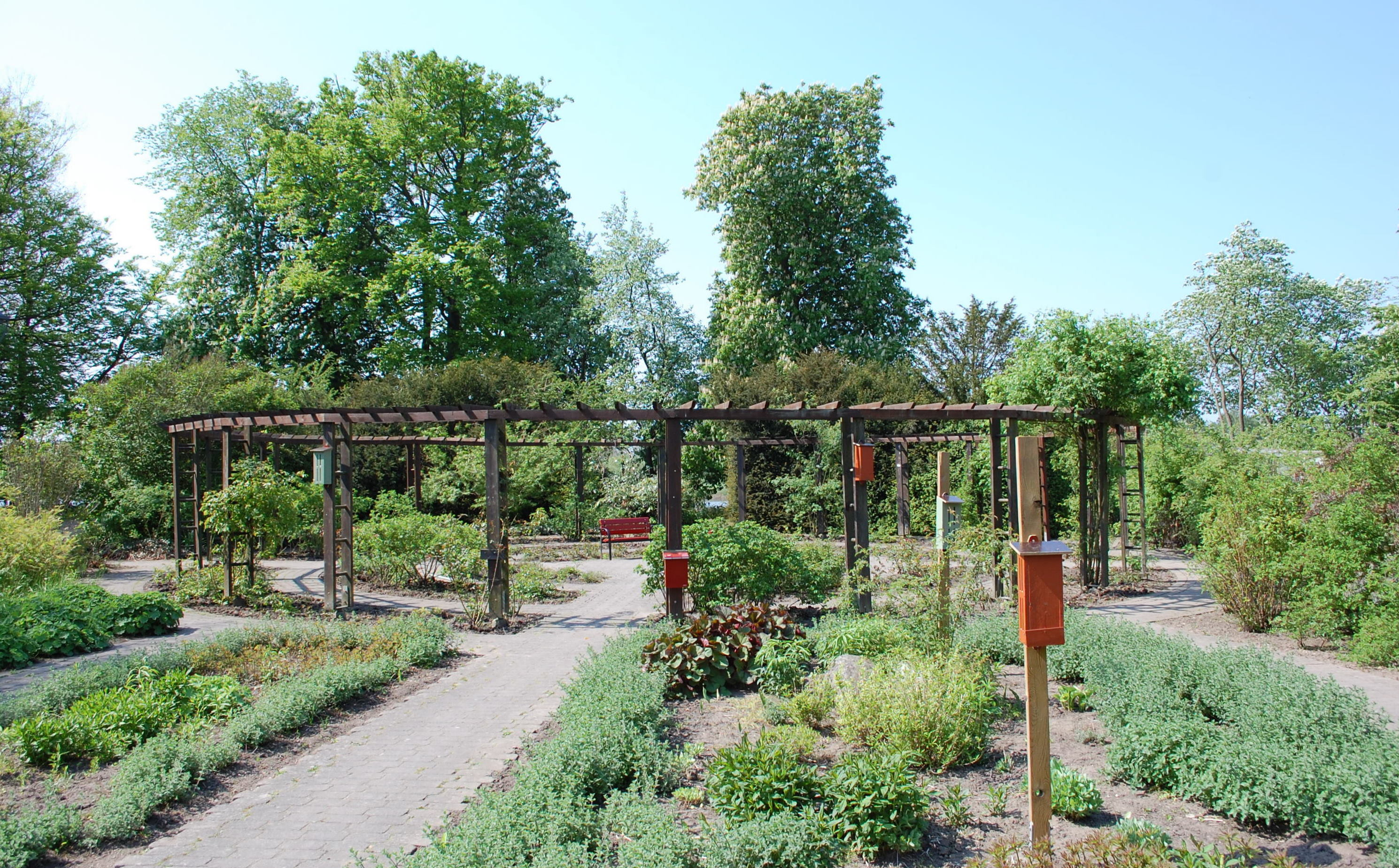 Garten im Tivolipark in Kristianstad